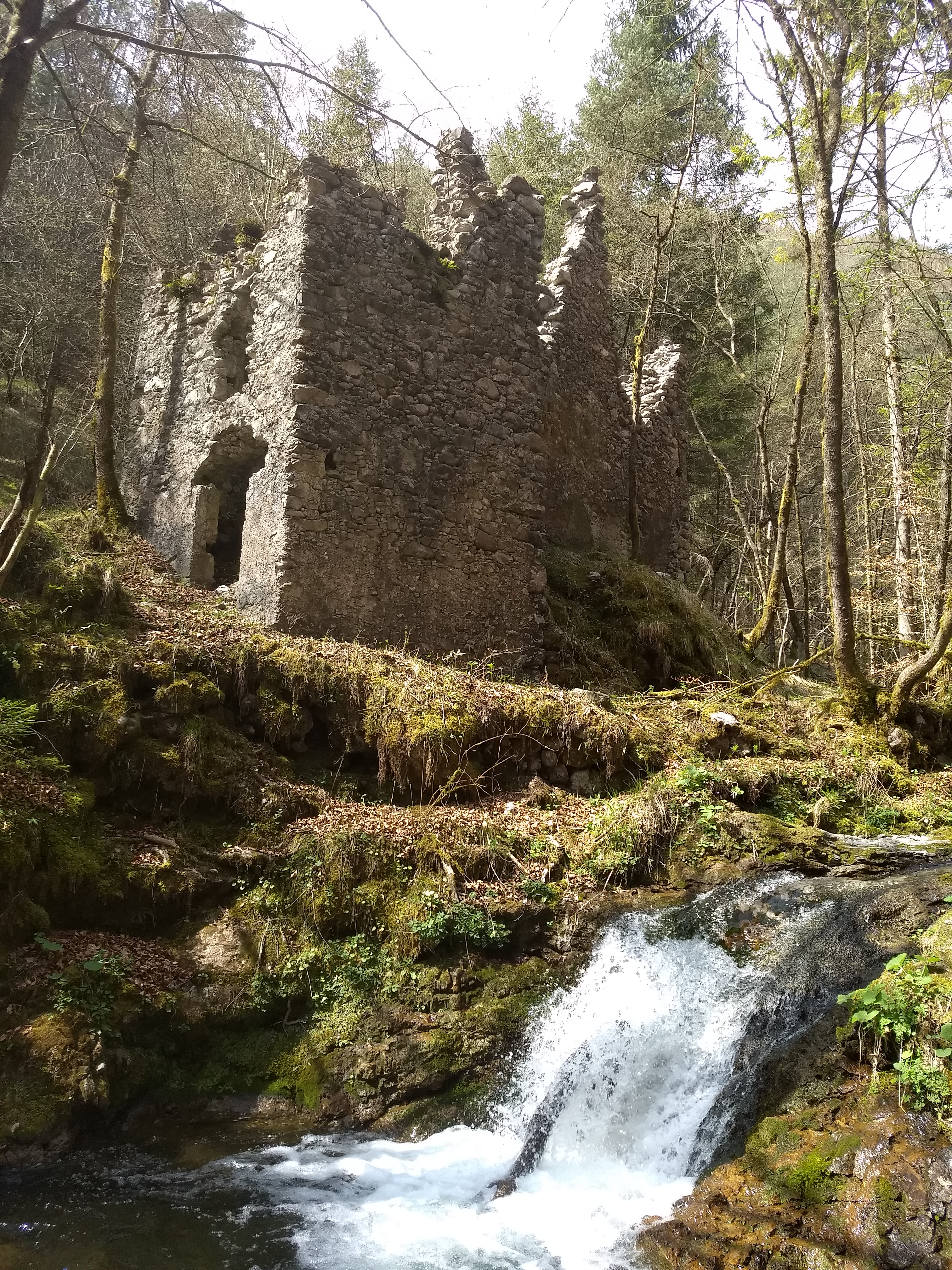 ruderi del mulino ad acqua di Armo di Valvestino